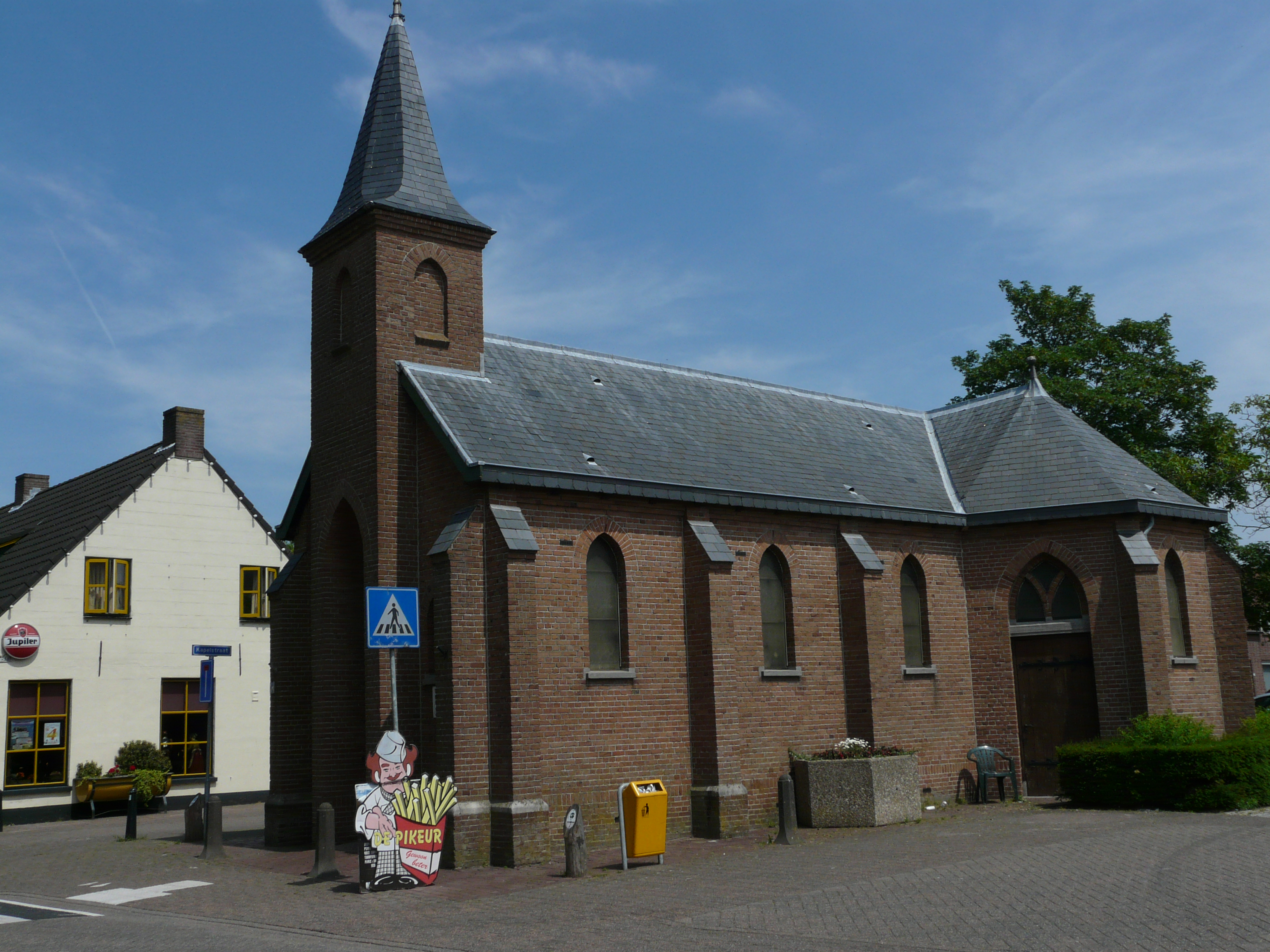 Kapelleke in Zegge